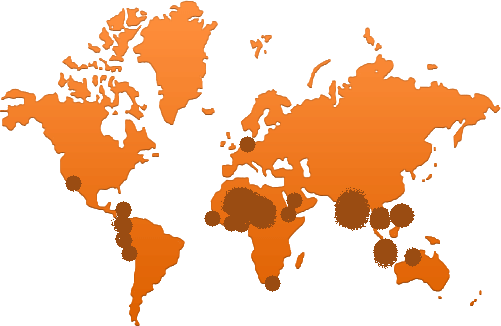 Colaboradores vigilia sida